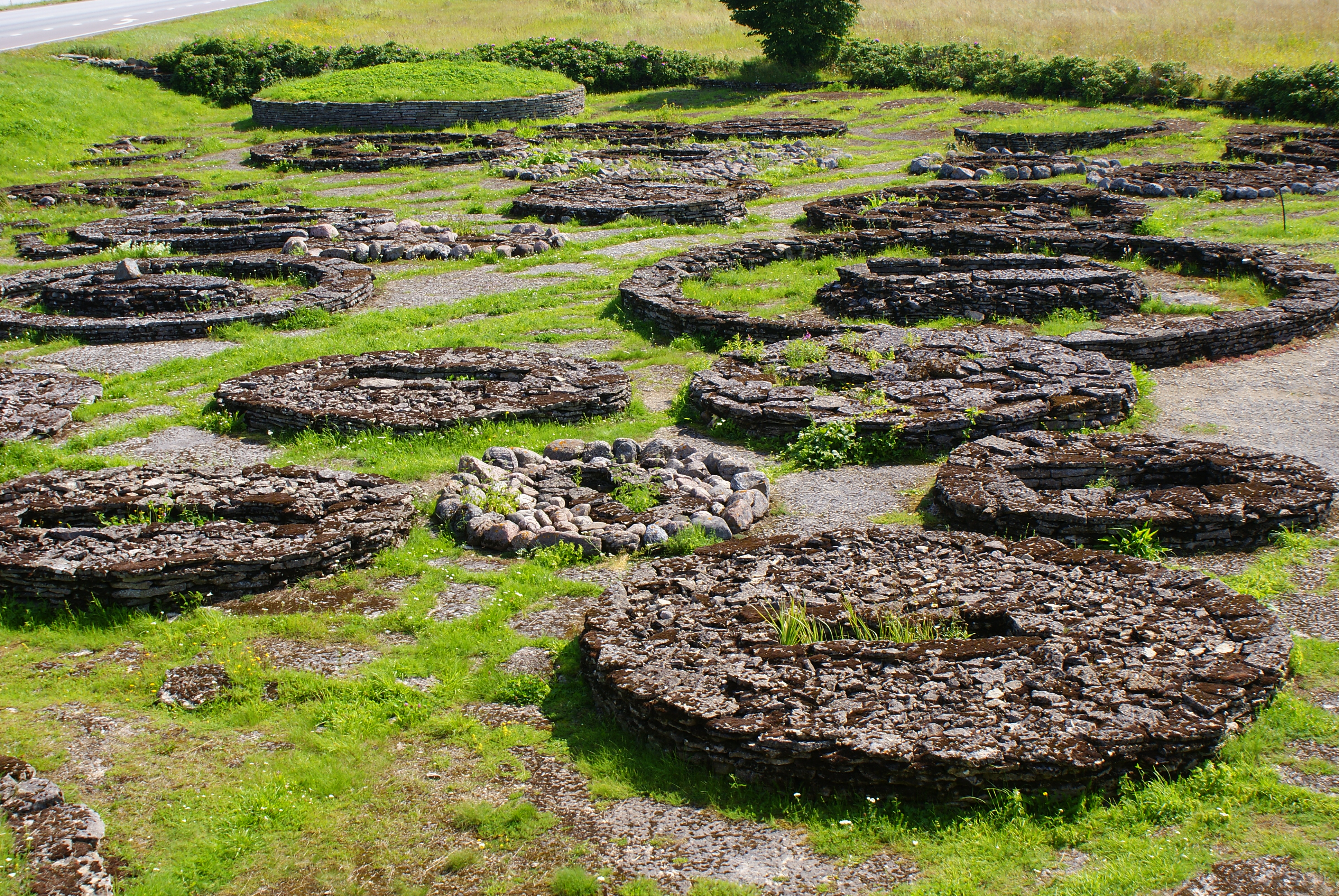 Kalmeväli Jõelähtmel Tallinna-Narva tee ääres